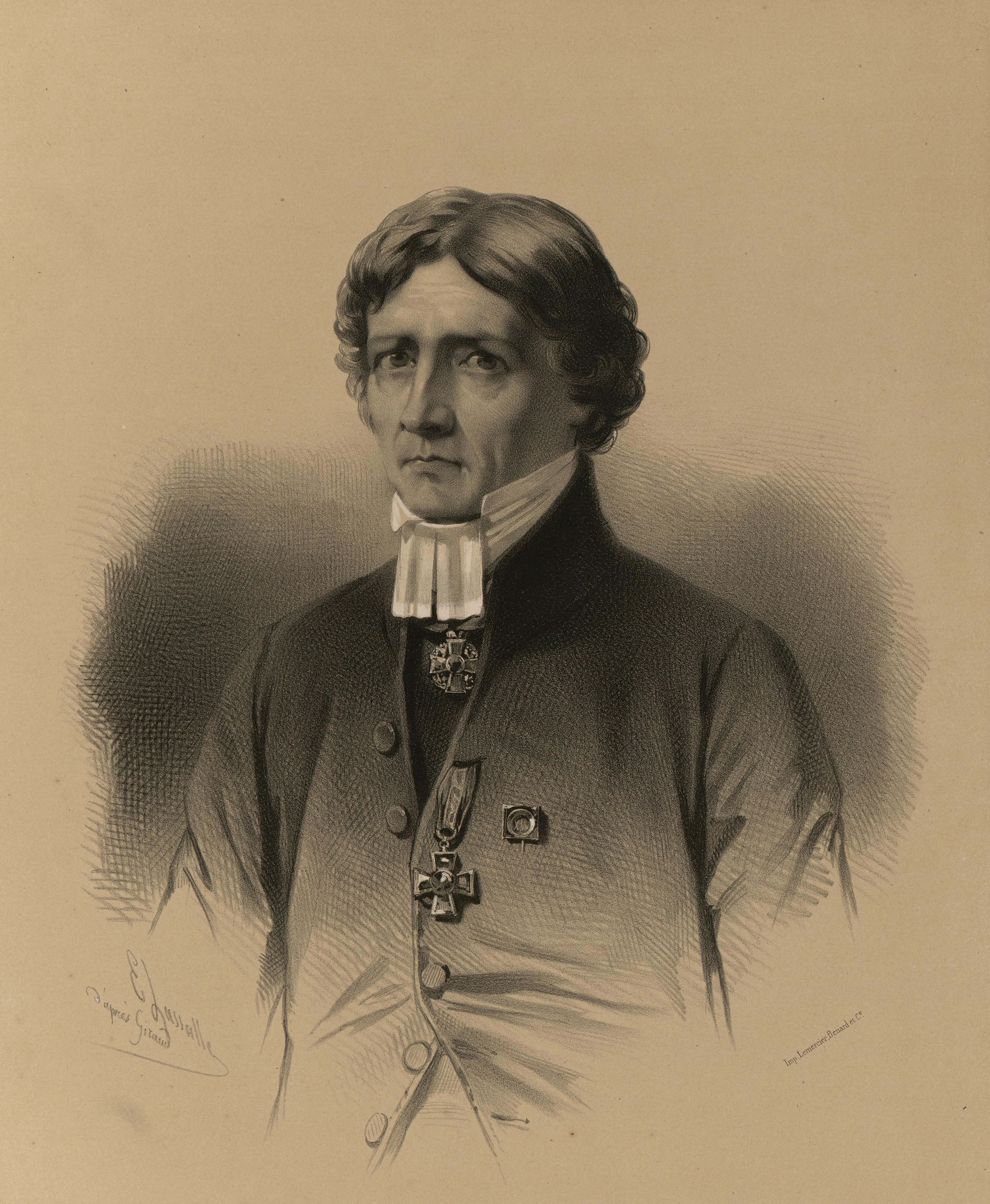 Illustrasjon hentet fra boken "Voyages de la Commission scientifique du Nord, en Scandinavie, en Laponie, au Spitzberg et aux Feröe" av ukjent forfatter og utgitt av Arthus BertrandParis : Arthus Bertrand, [1852] (Paris, [1852])